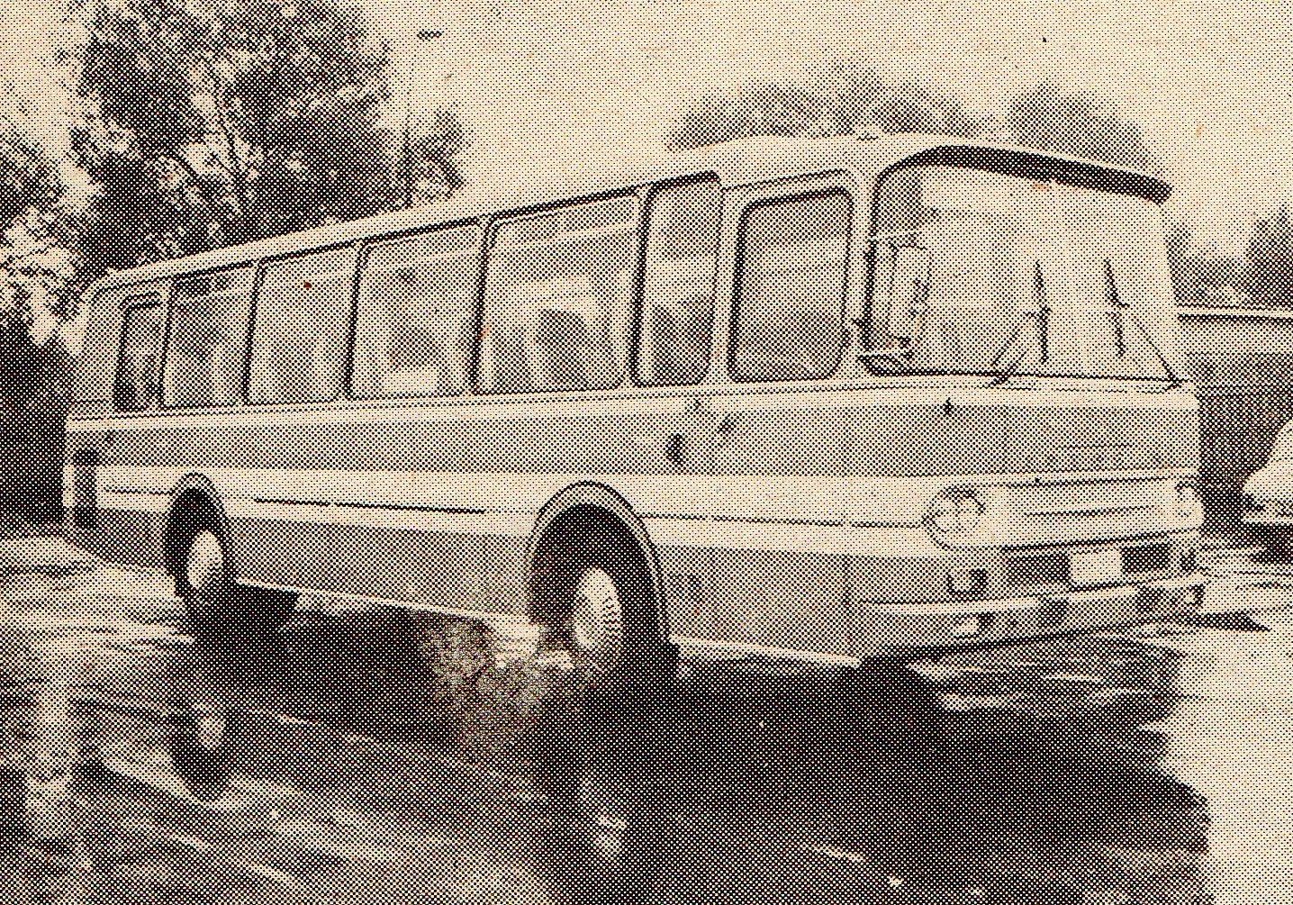 Autosan H-100 w wersji międzymiastowej.